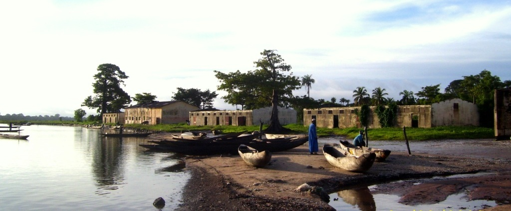 Le Tendaba de Goudomp est composé de plusieurs installations de bâtiments de grilles des poissons fumés dont le plus connu fut le "le metora" de Goudomp, connu , à l'époque dans toute la sous-région ouest africaine.